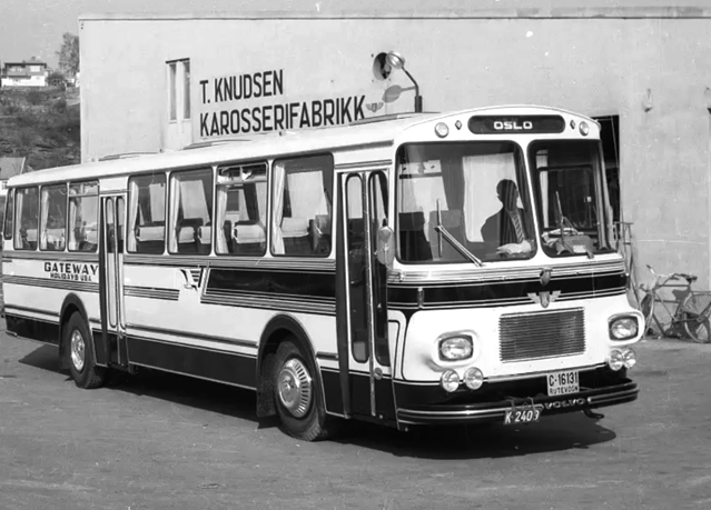 T. Knudsens Karosserifabrikk